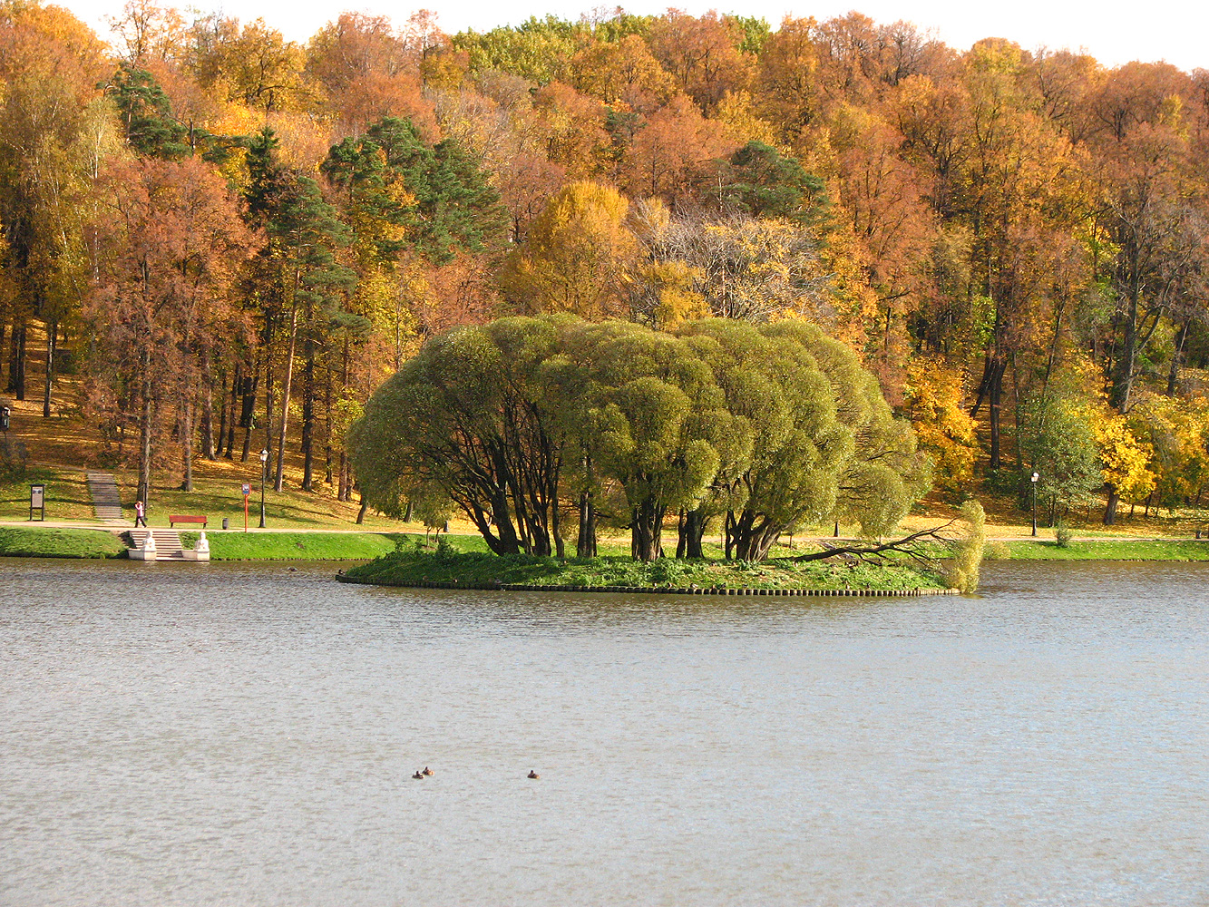 Верхний Царицынский пруд